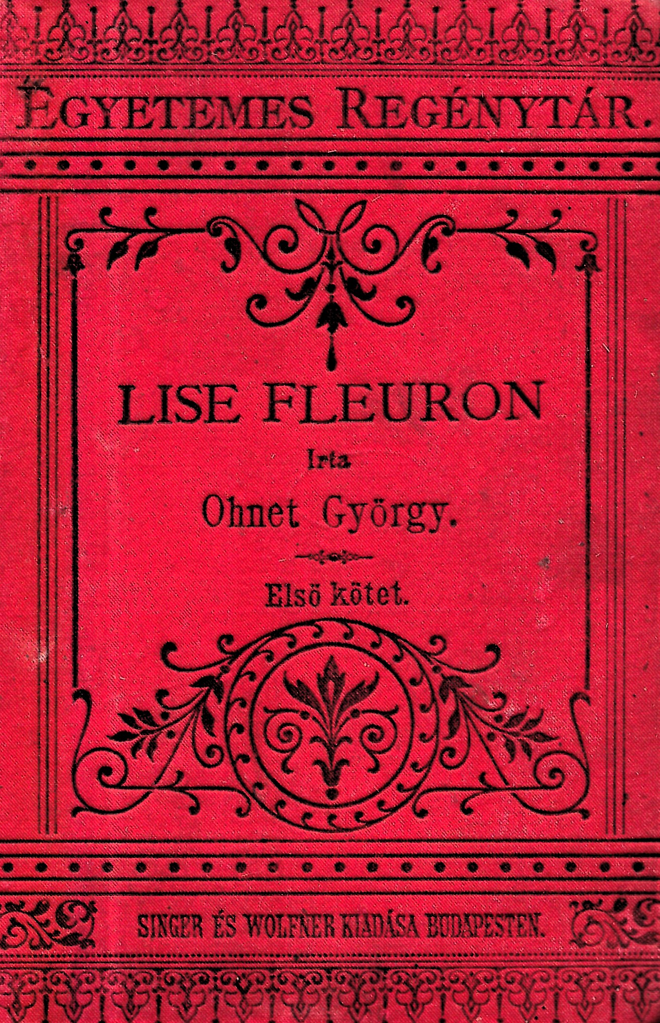 Georges Ohnet (1848-1918): Lise Fleuron (1886)